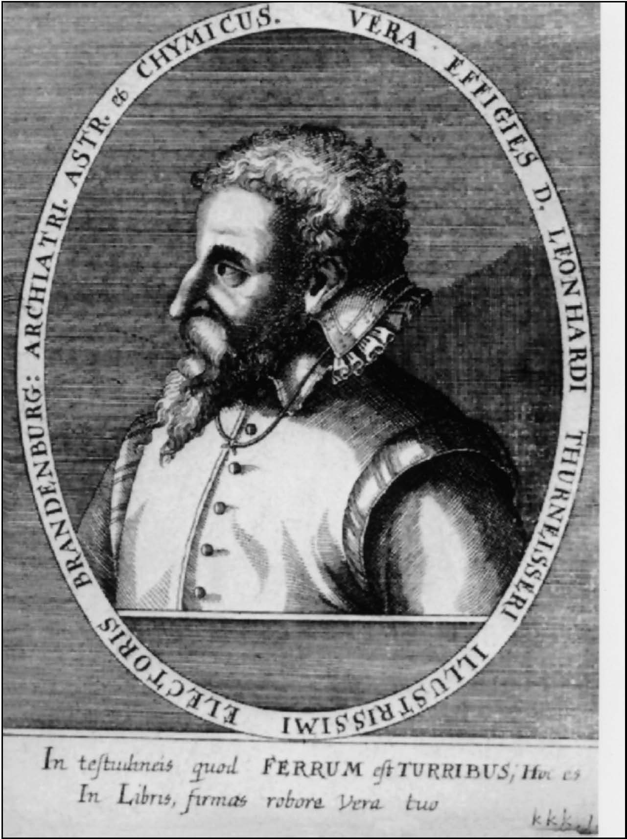 Der Gelehrte und Wunderdoktor Leonhard Thurneysser (1531-1595)